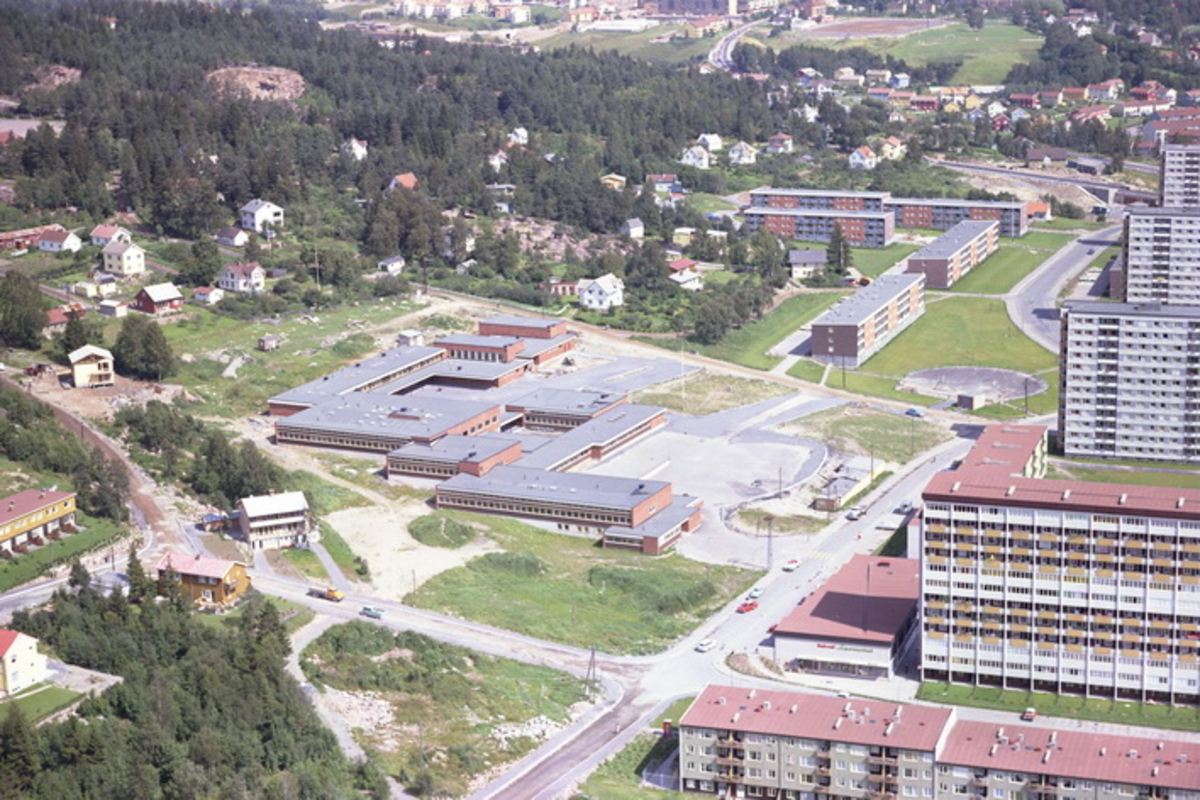 Flyfoto, Rødtvet skole midt på bildet. Sandåsveien krysser Rasmus Engers vei i forgrunnen